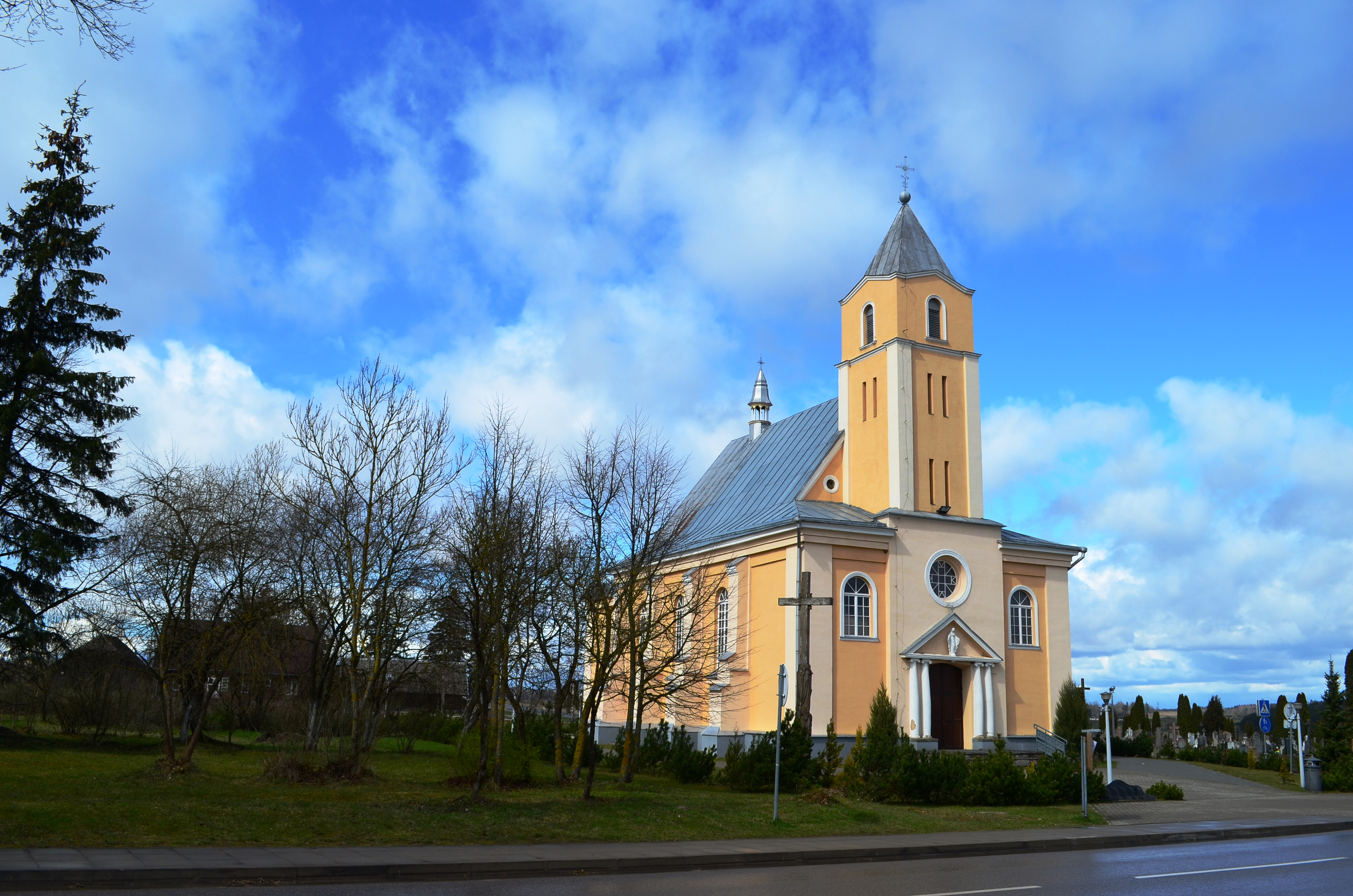 Riešės bažnyčia, Didžioji Riešė, Vilniaus raj.